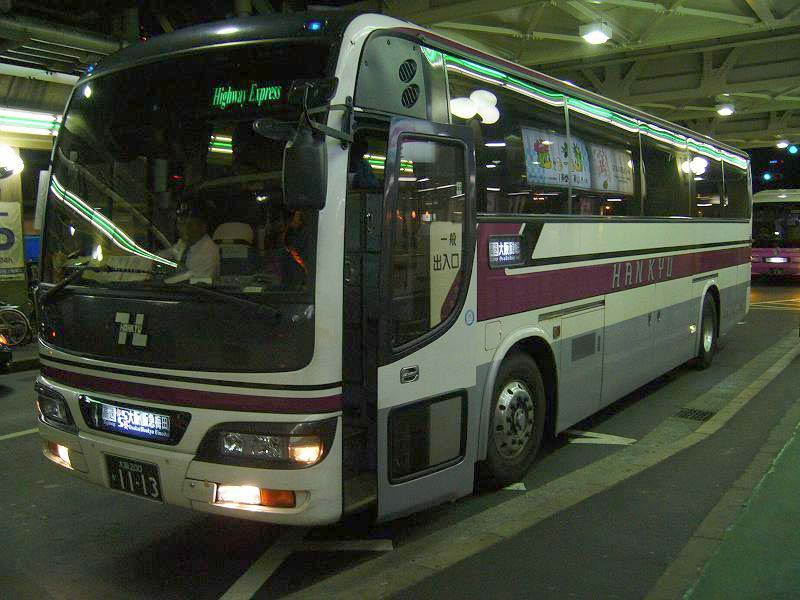 登録番号 大阪200か11-13 阪急バス所属 大阪～新見・三次線用 2006年11月12日 阪急三番街にて撮影